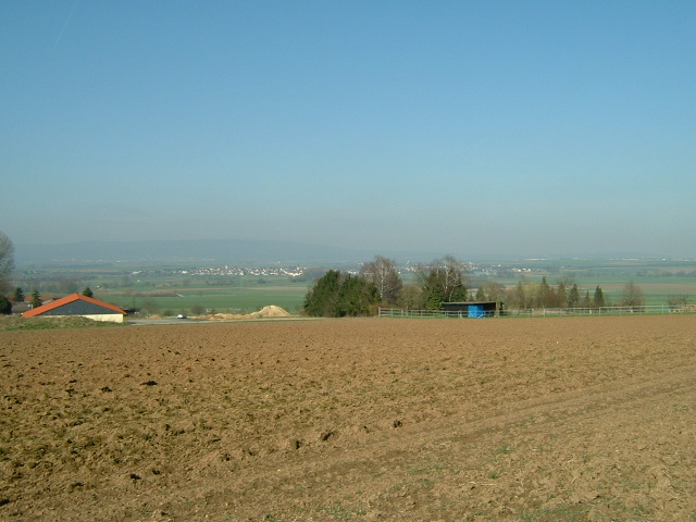 Wöllstadt, Ortsteil Nieder-Wöllstadt in Hessen, Wetteraukreis, Bild aufgenommen von Burg-Gräfenrode aus